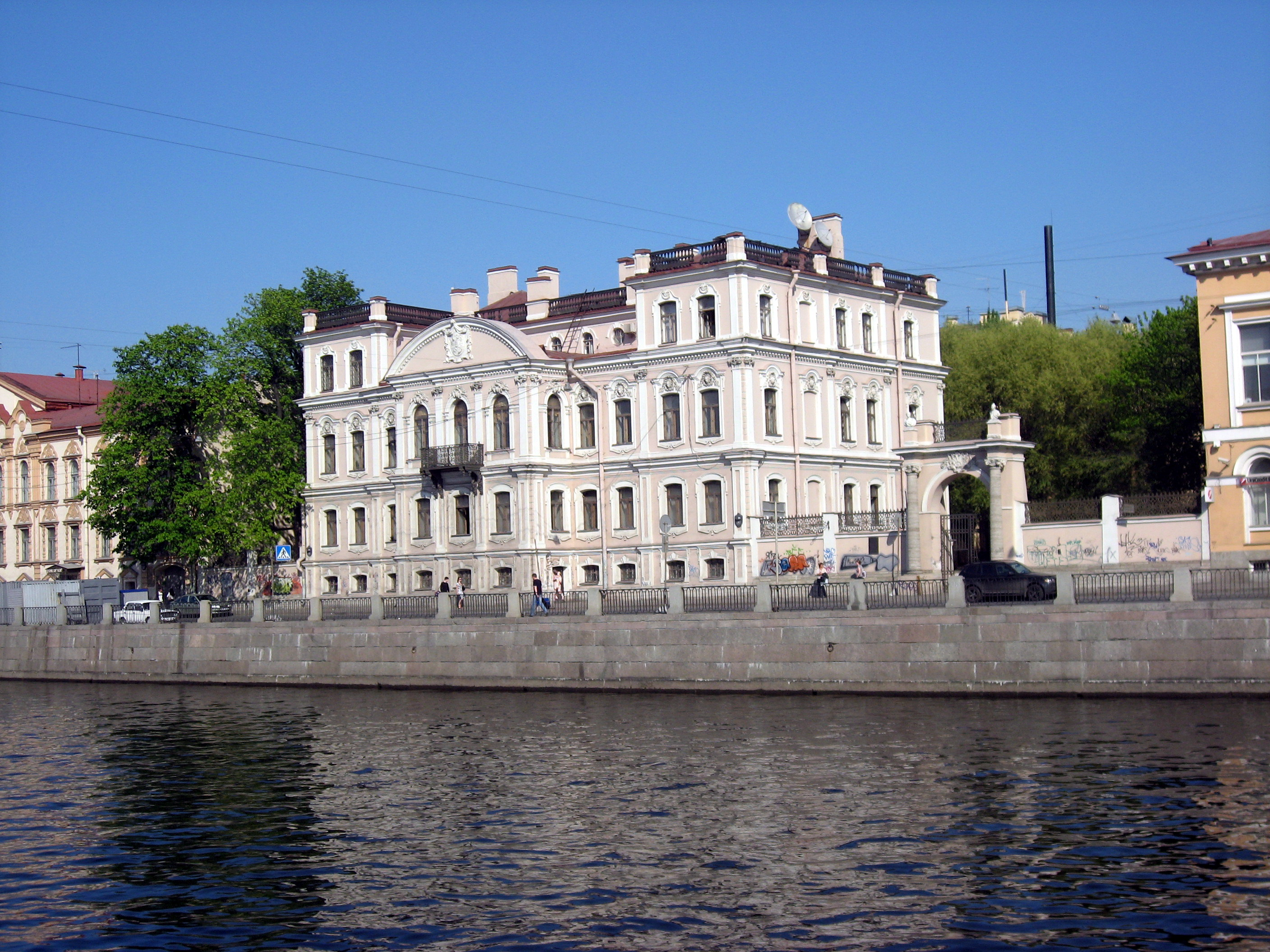 Sankt-Petěrburg (Petrohrad)